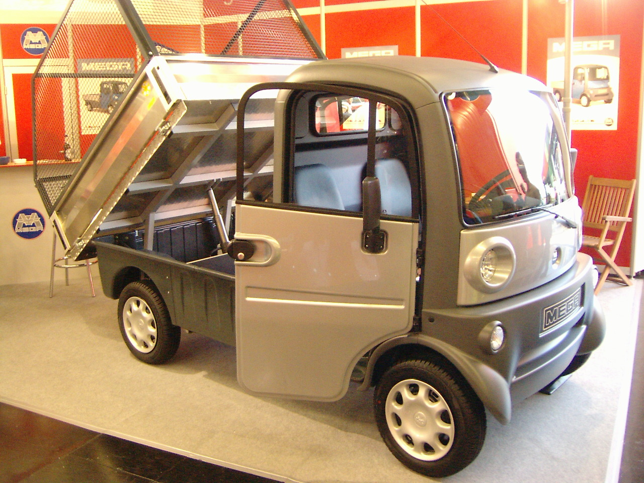 Mega elektrische bestelwagen op GaLaBau (Garten und Landschaft Bau) in Nürnberg